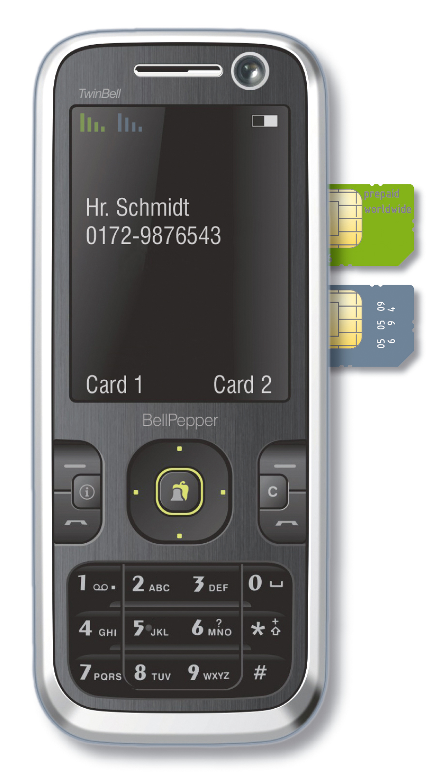 Motiv: Dual-Sim-Handy (Prototyp des Modells Twinbell). Das Gerät ist gleichzeitig auf zwei Nummern (SIM-Karten) betriebsbereit, für jede SIM-Karte gibt es eine separate Sende/Empfangsanzeige und separate Annahmetasten. Die Abbildung beiden SIM-Karten haben Symbolwert, die vom Mobiltelefon benutzten Simkarten liegen intern.